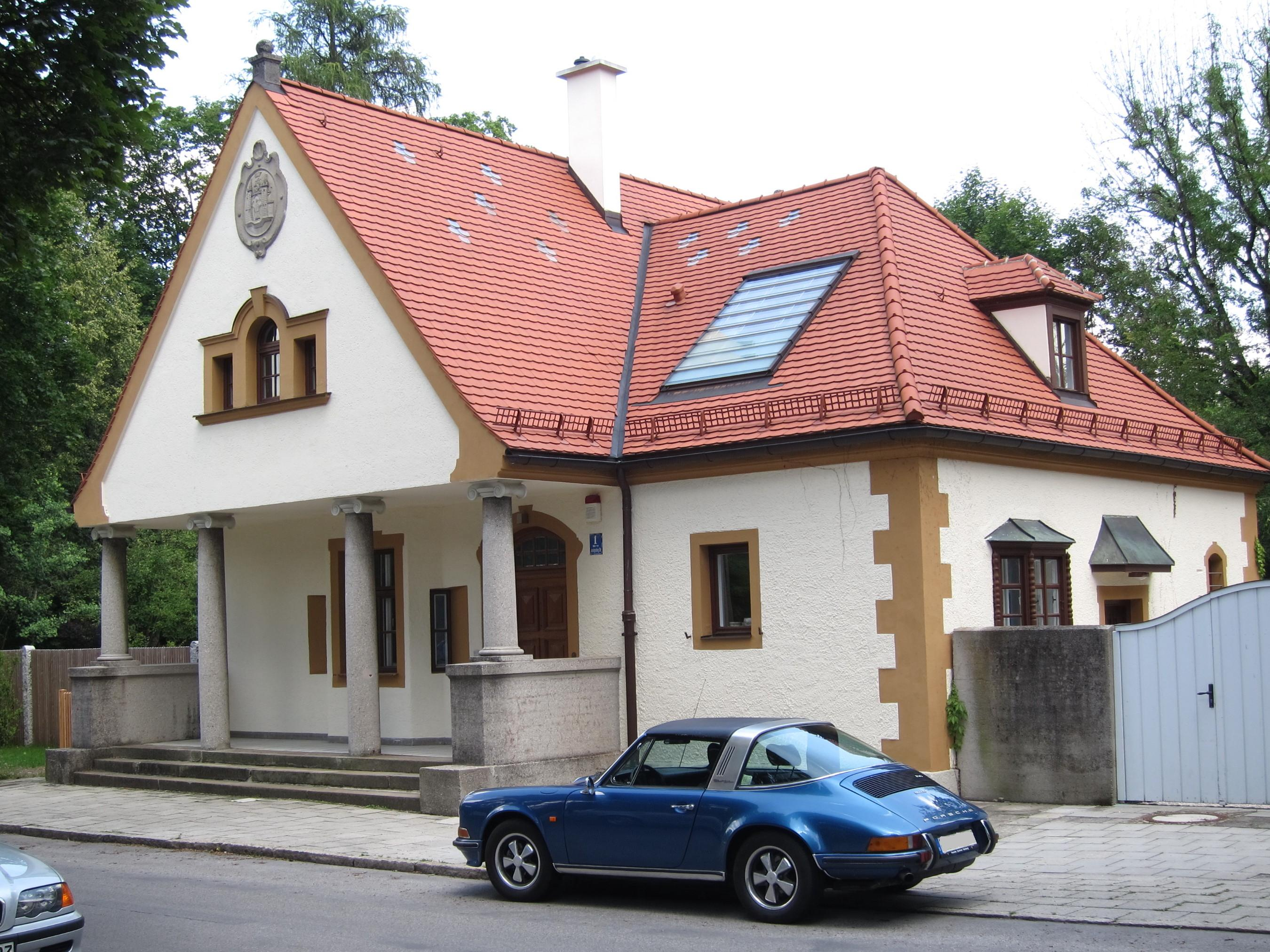 Geiselgasteigstraße 1; Ehem. Zollhaus, kleines Wohnhaus mit Portikus, 1894 von Hans Grässel.